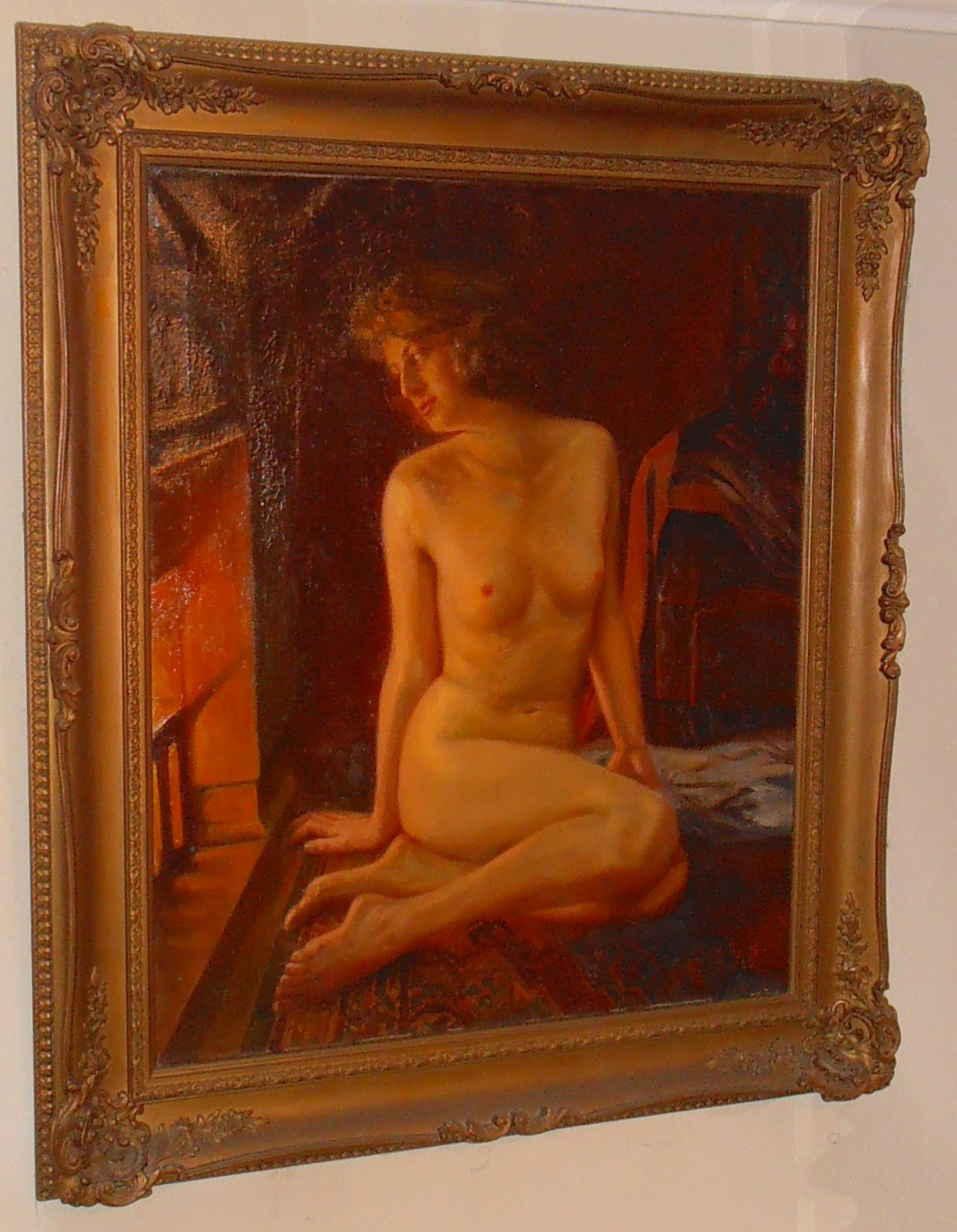 Ölgemälde der nackten Grete Itzen vor einem Kamin, gemalt 1925 von ihrem späteren Ehemann Georg Thiele, Bremerhaven, Deutschland